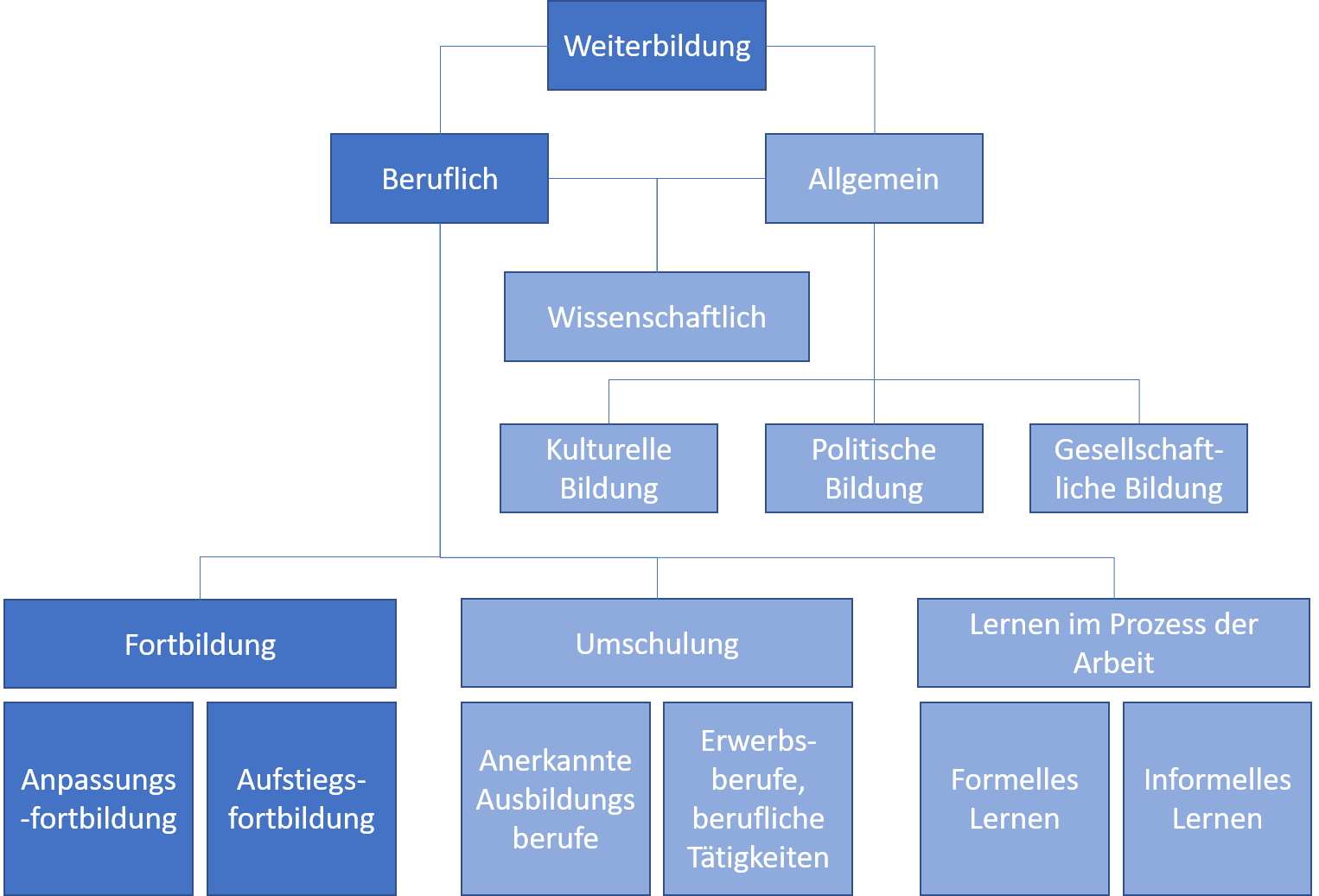 Unterteilung von Weiterbildungsmaßnahmen. In altem Ordner gefunden.